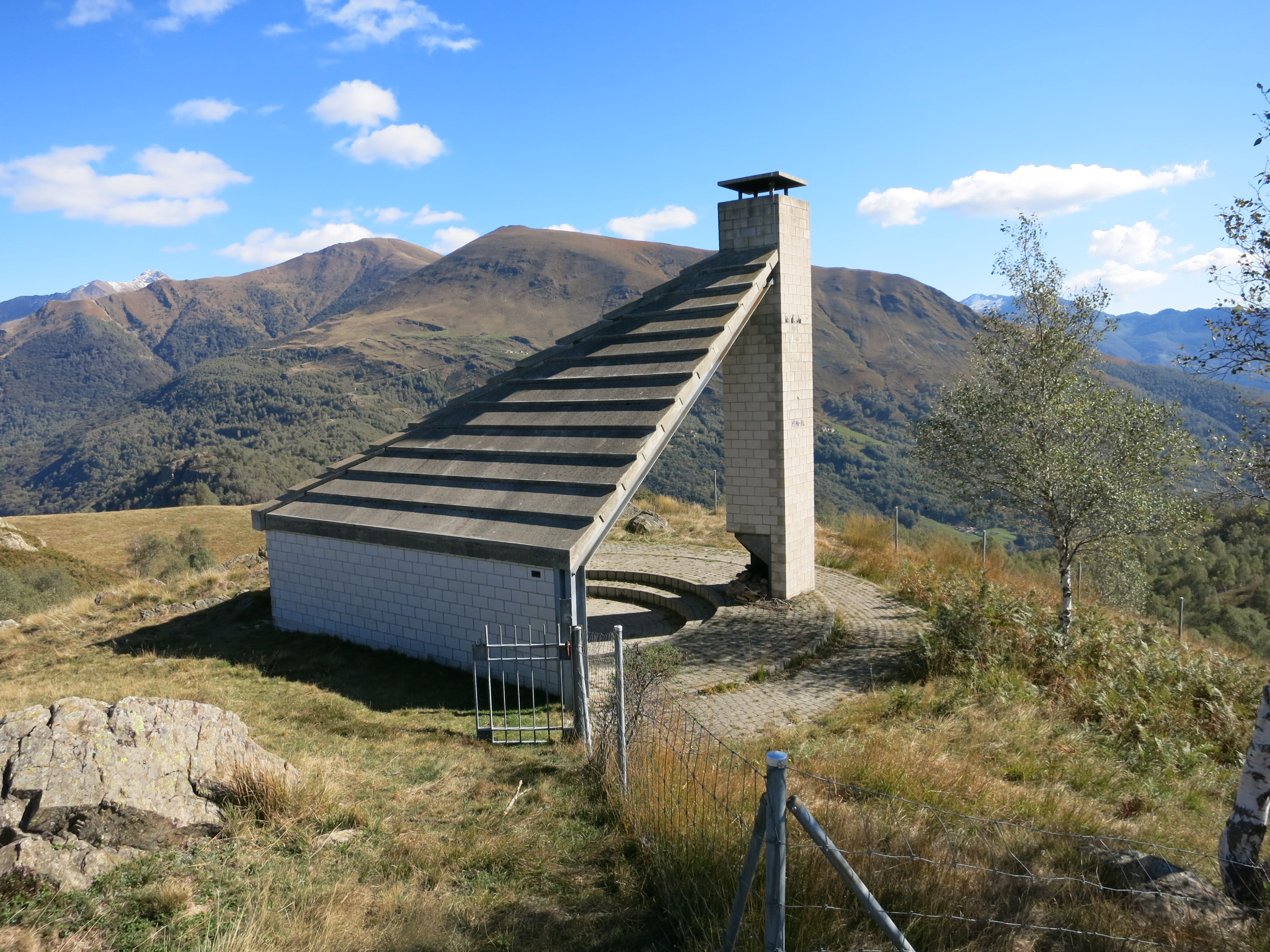 Sperrstelle Gola di Lago Ti, Schweiz